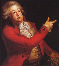 Honoré-Gabriel Riqueti de Mirabeau (1749-1791)